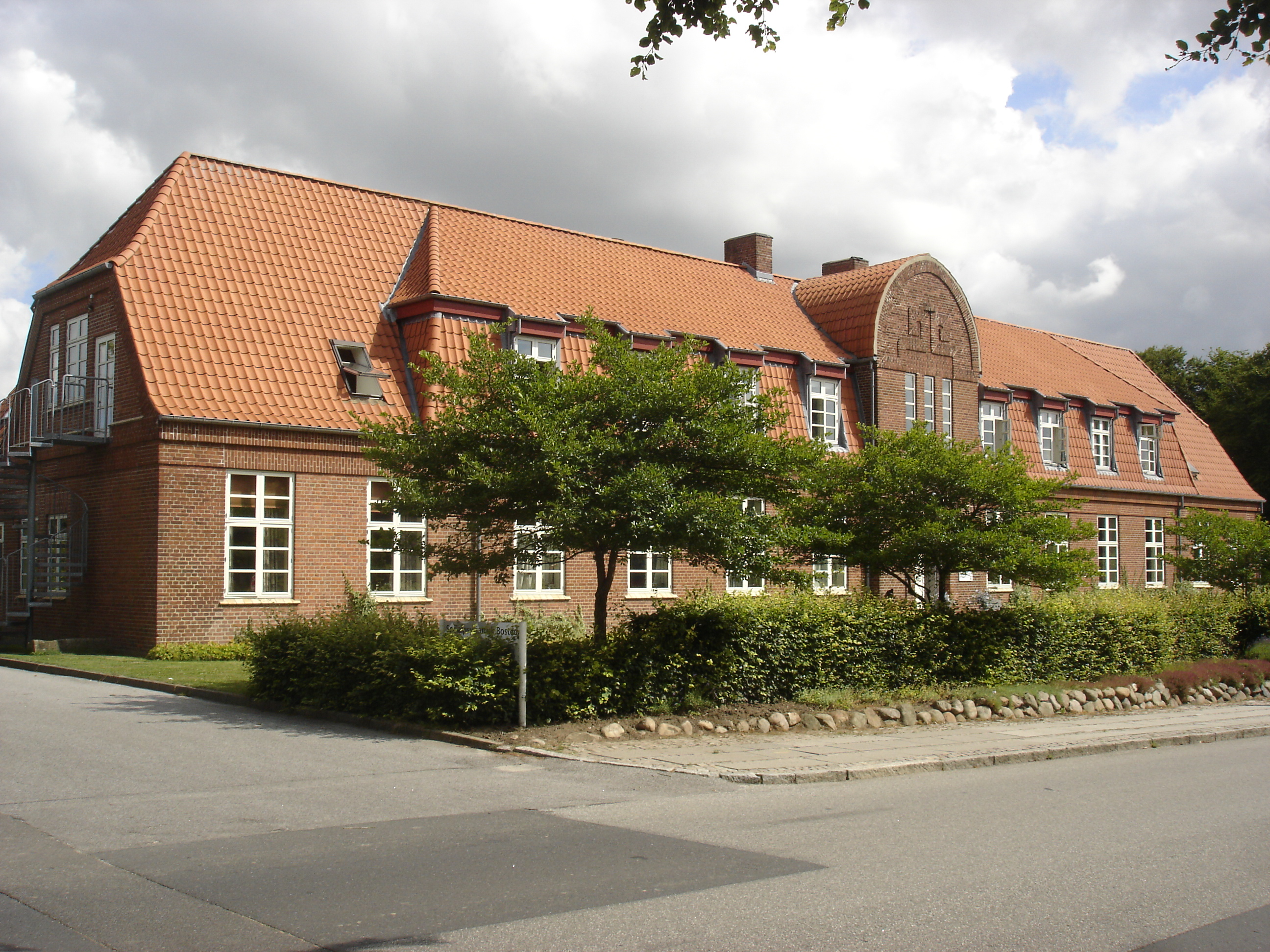 Kjellerups ældste sygehus, nu Socialpsykiatrisk Bosted